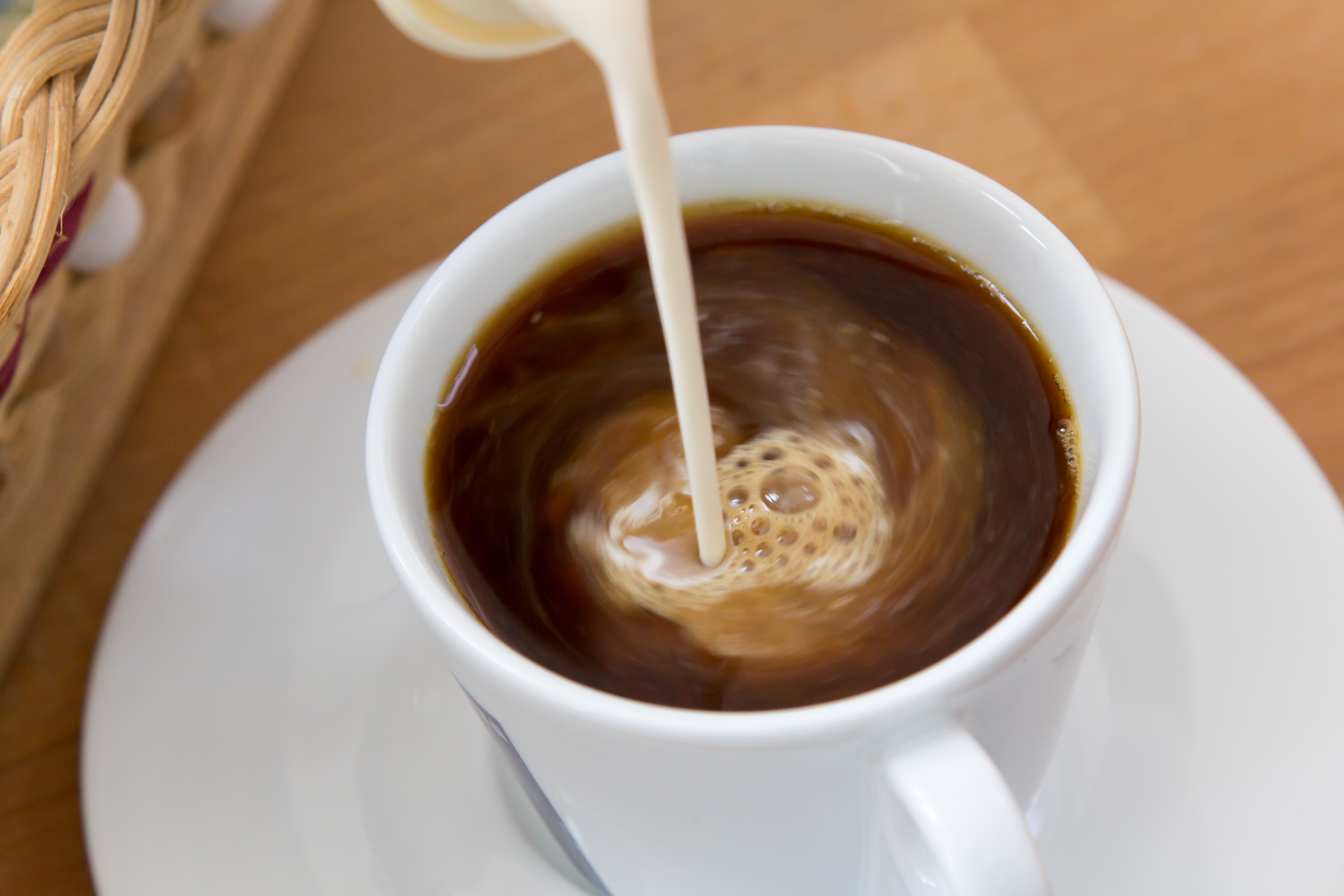 Kondensmilch (Bärenmarke 12%) wird in Filterkaffee gegeben